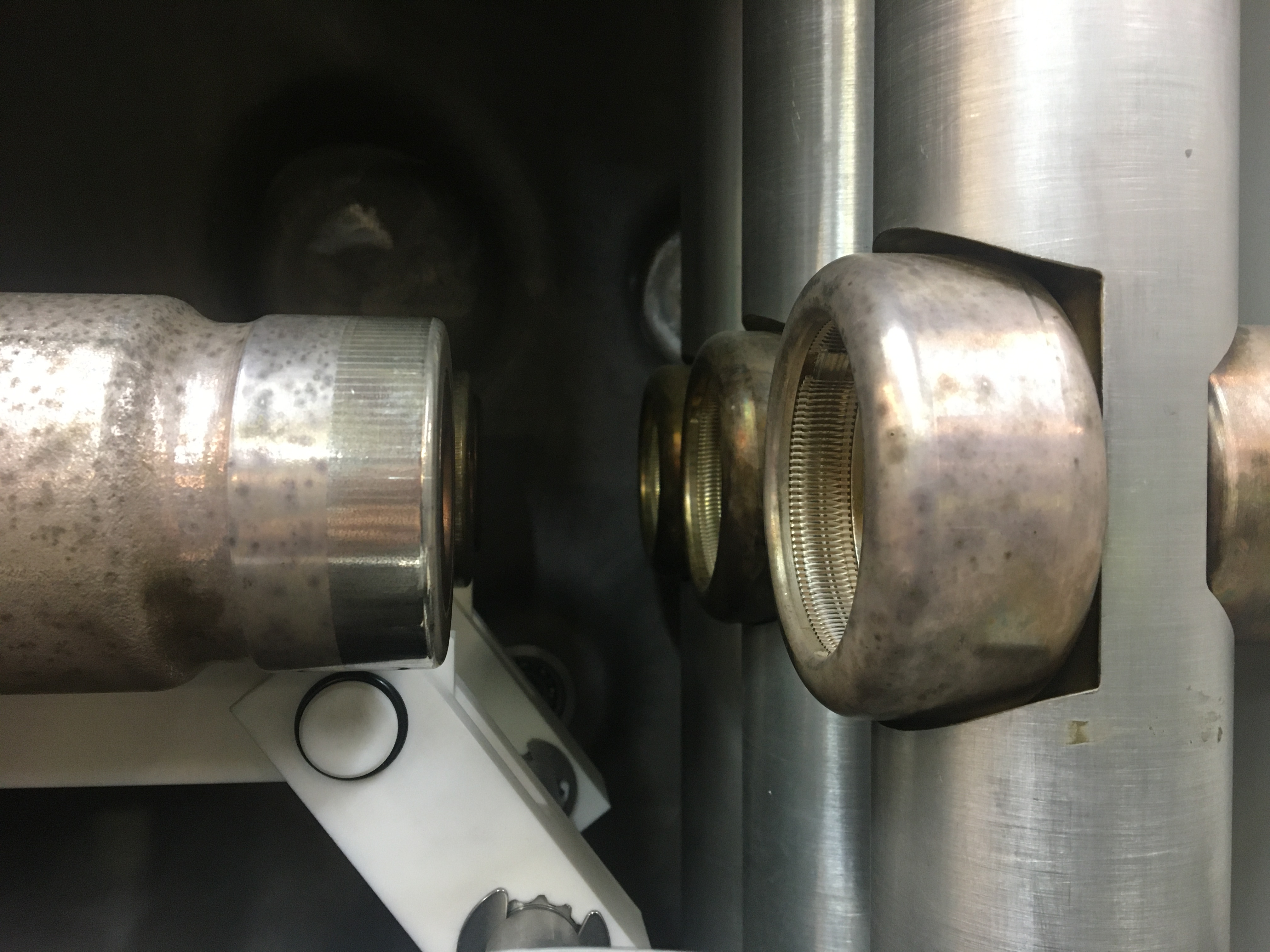 Sectionneur ouvert 63 kV de grande puissance